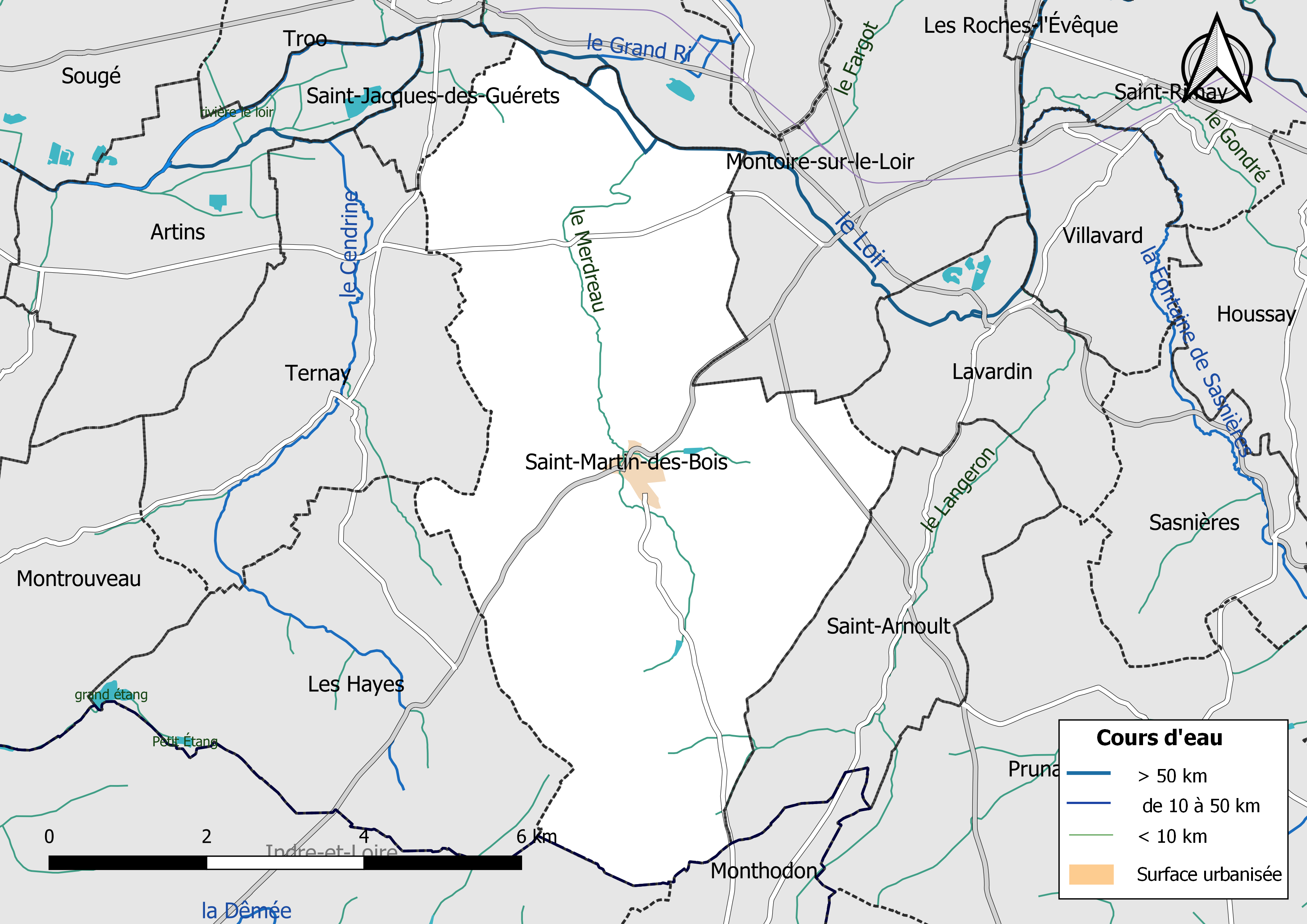 Carte du réseau hydrographique de la commune de Saint-Martin-des-Bois (Loir-et-Cher, France).